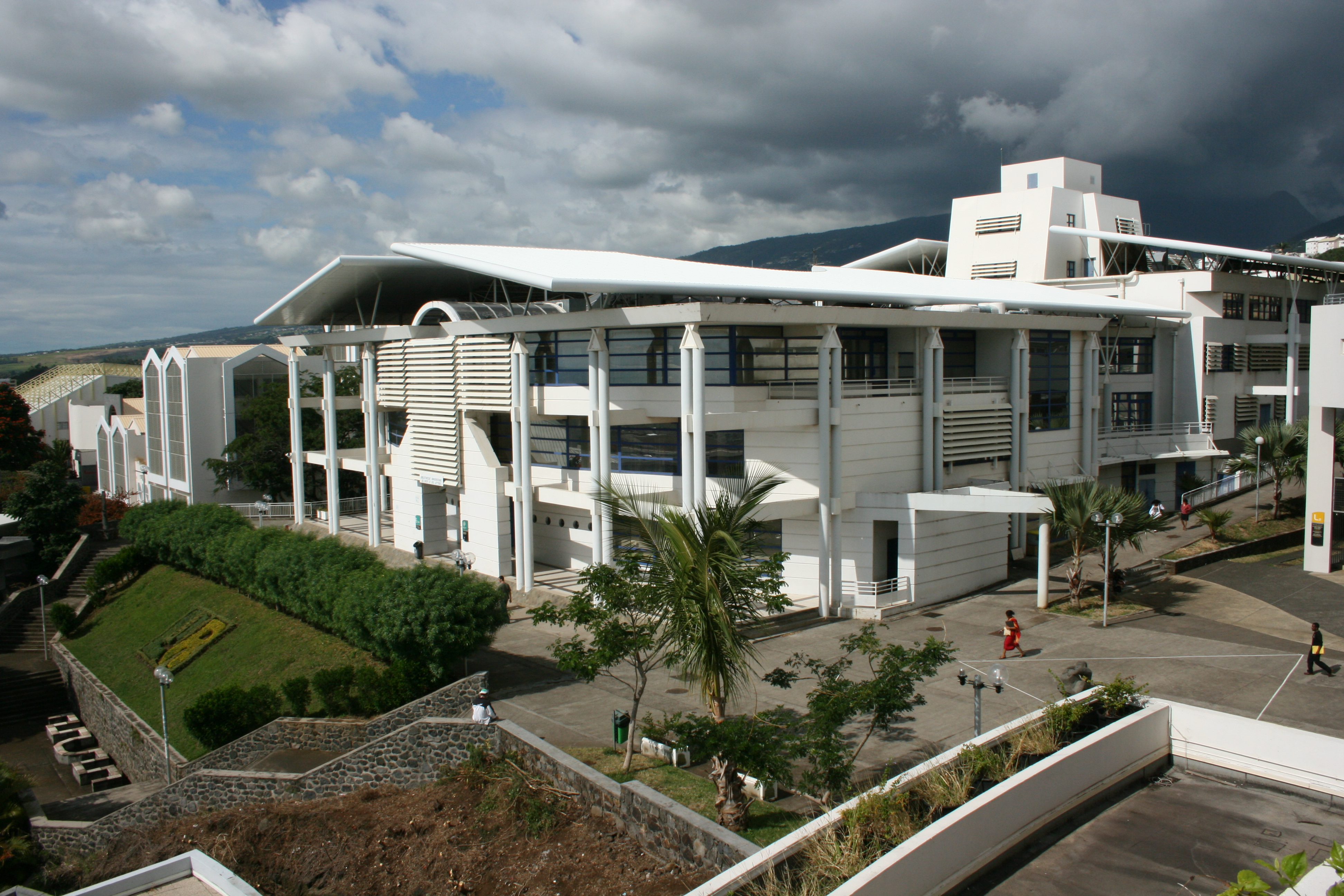 La bibliothèque de la faculté de droit et d'économie de l'université de la Réunion sur le campus du Moufia